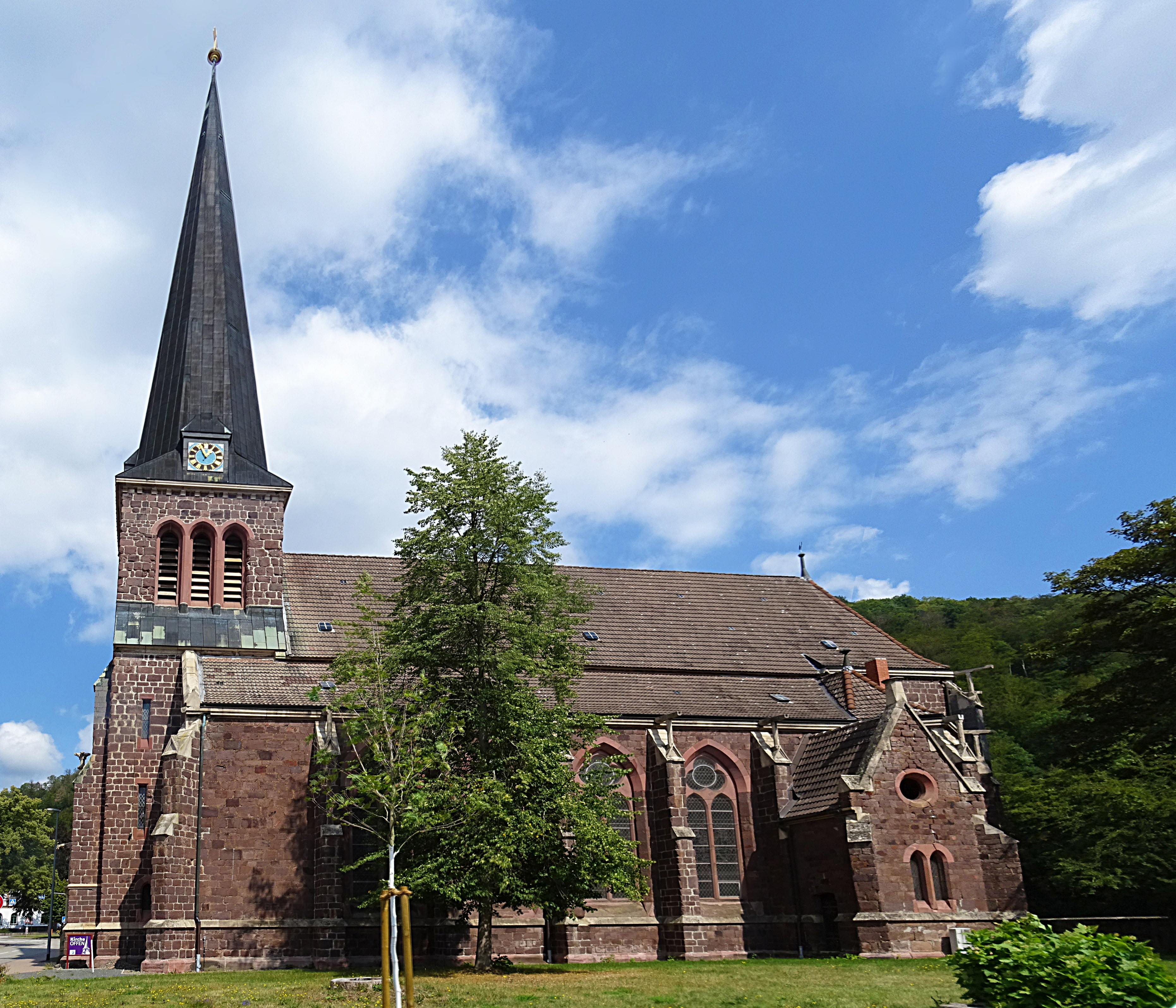 Stiftskirche St. Georg-Marien (Ilfeld)